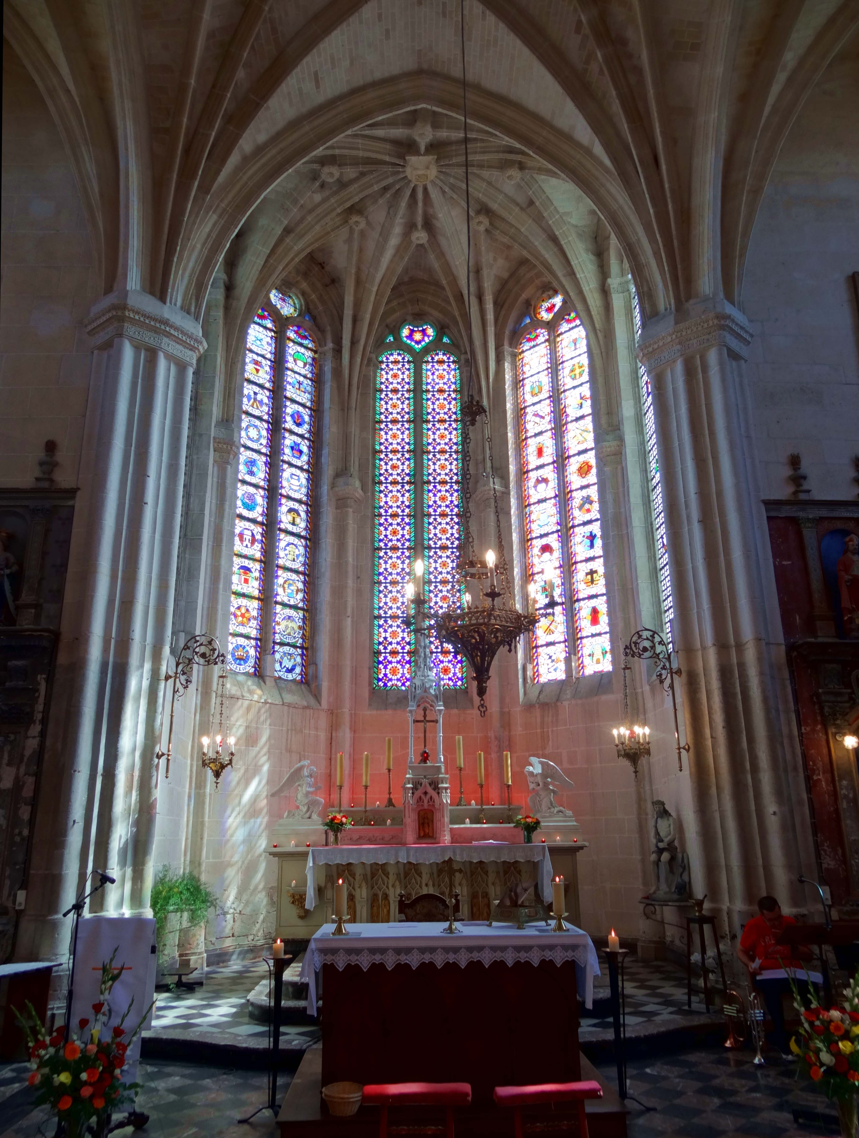 Intérieur de l'église - voir titre.